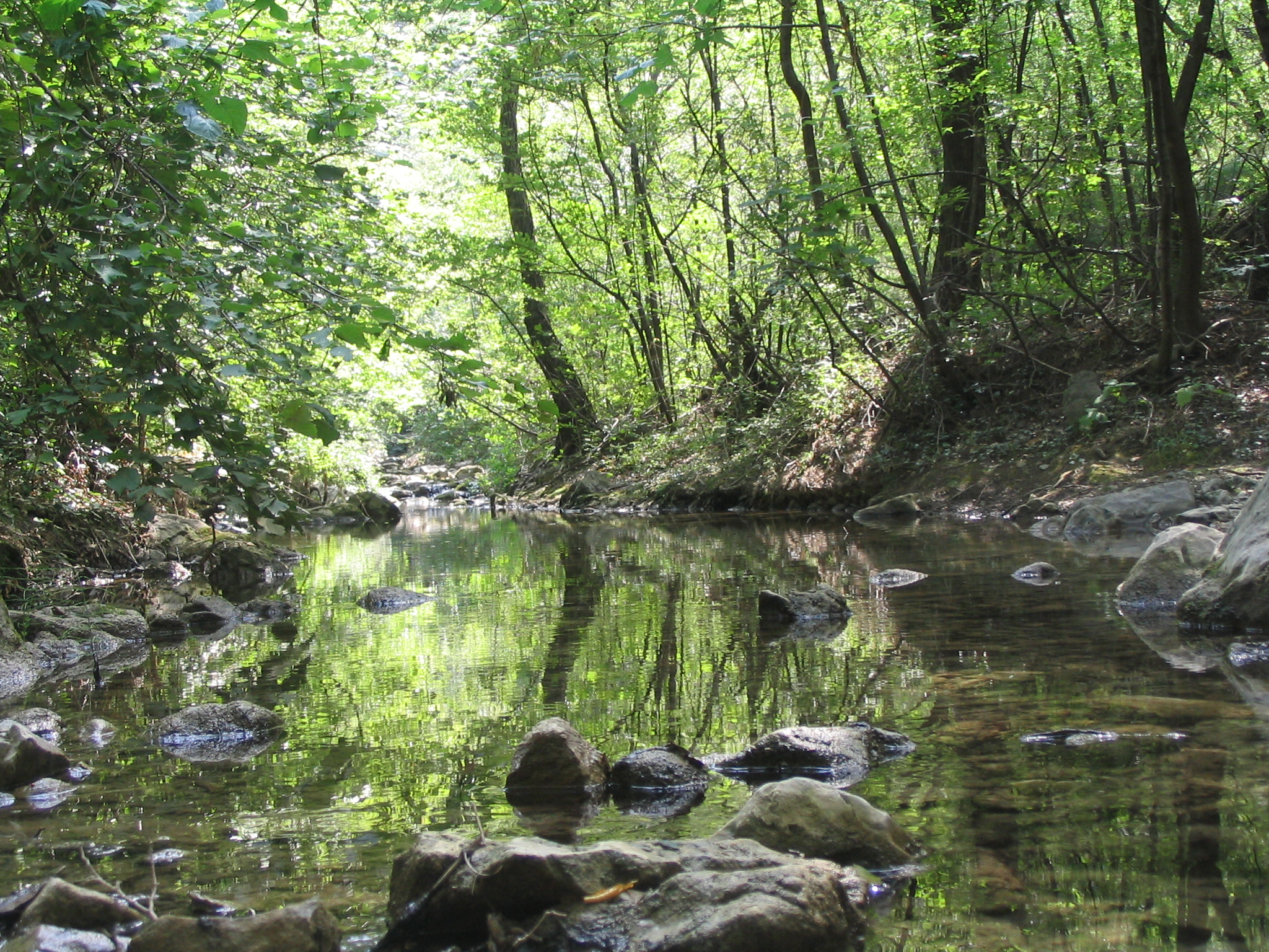 River Rosandra near Trieste. Photo taken by User:IzTrsta in July 2005 with a digital camera. Questa foto non corrisponde alla realtà. Gli alberi sono stati abbattuti dai selvaggi della "Protezione civile Regionale del Friuli" nel mese di Aprile 2012.